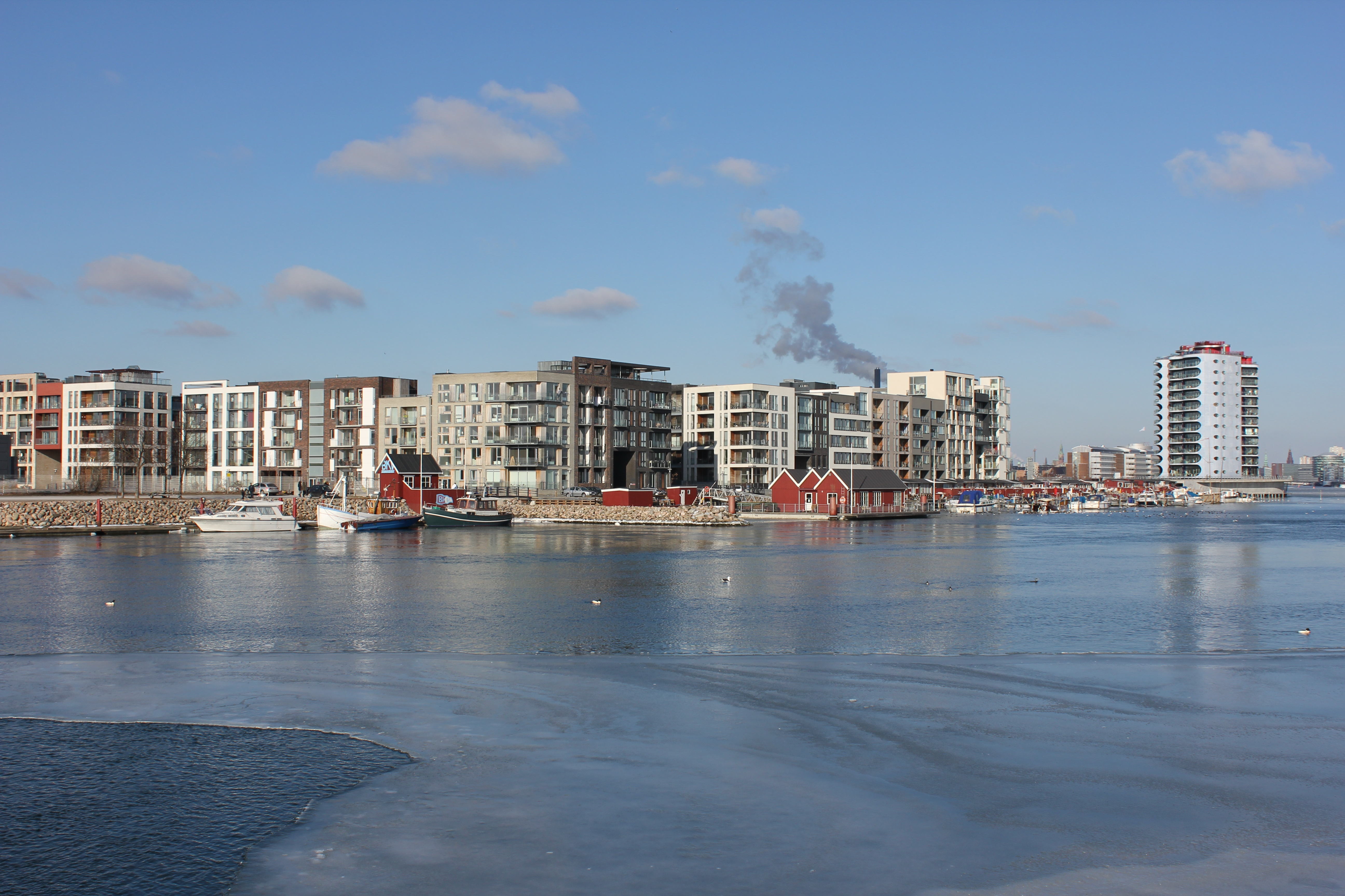 Sluseholmen i København